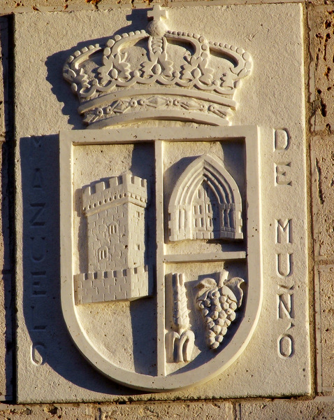 Escudo de Mazuelo de Muñó. Burgos. España.